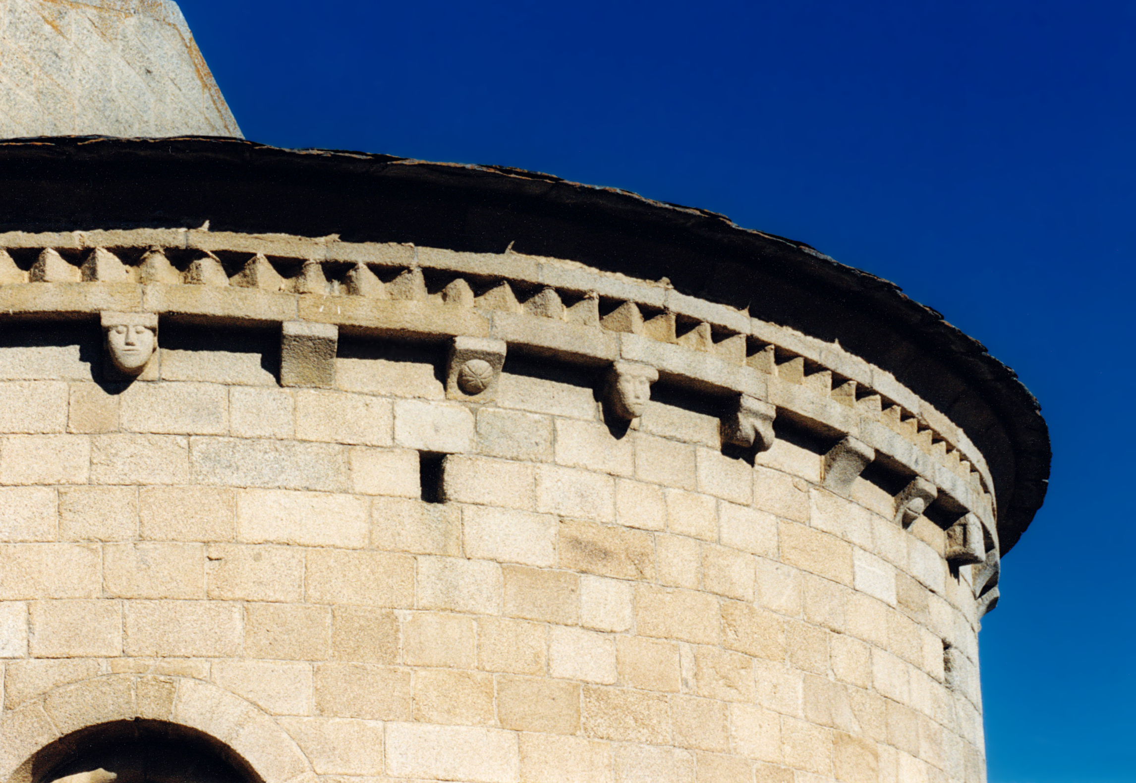 France - Cerdagne - Église Saint-Martin d'Hix